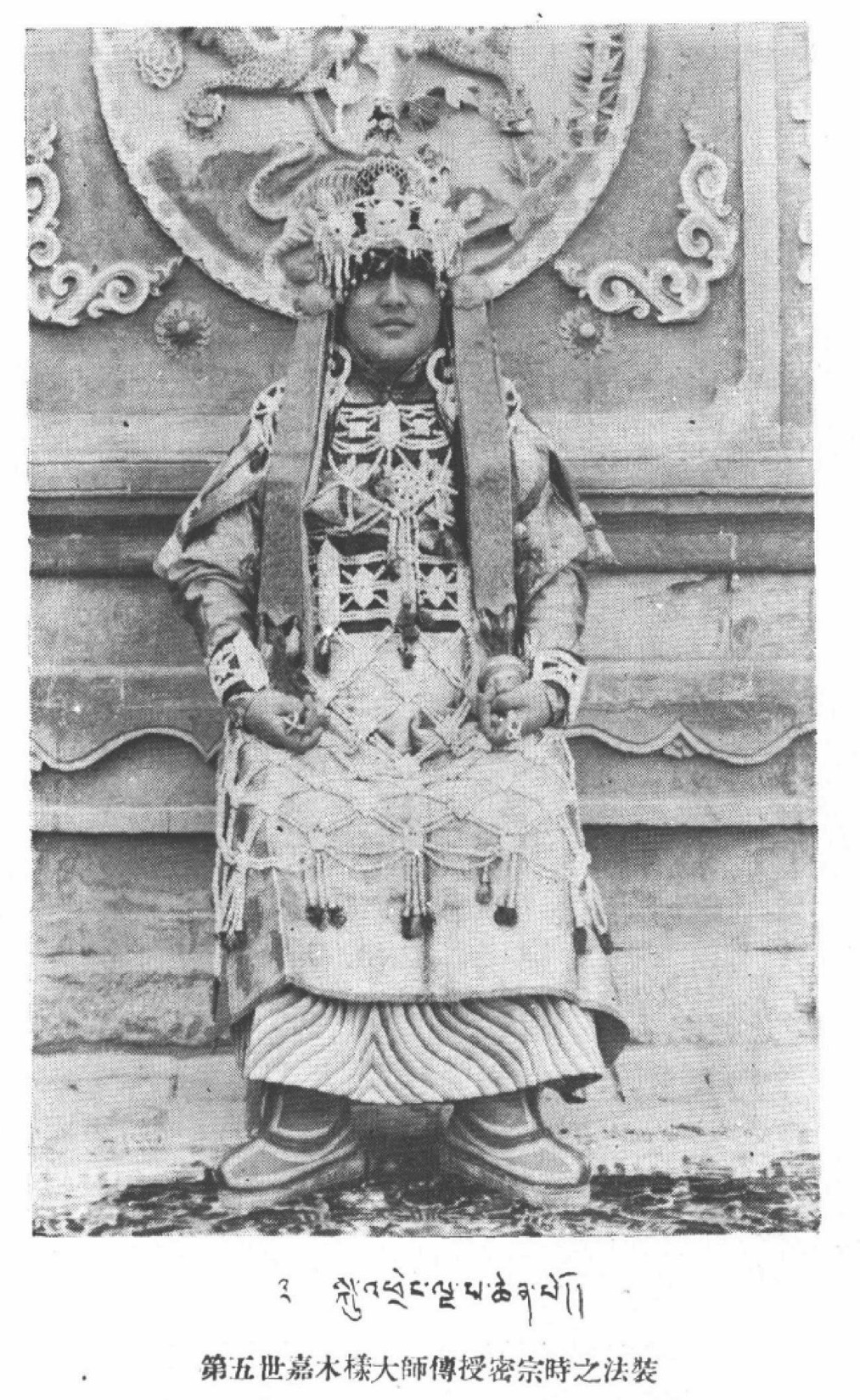 黃正光 嘉木樣